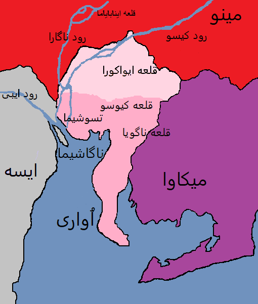 Provinces of Japan Owari 1555